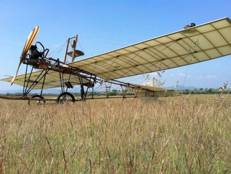 Szolnoki Sportmúzeum. A Kvasz I. újraépített másolata